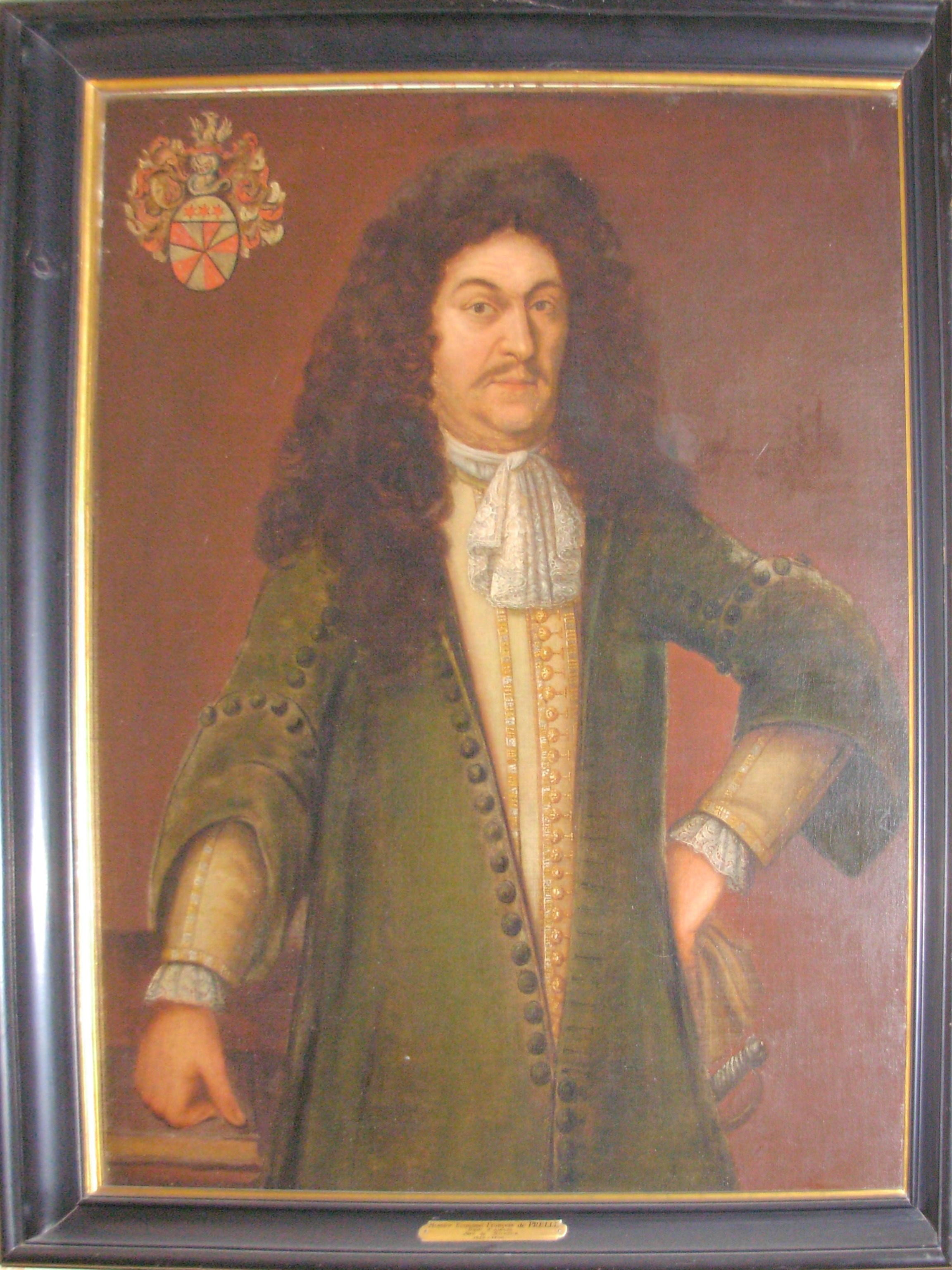 Emmanuel-François de Prelle dit Compère (1629-1700)